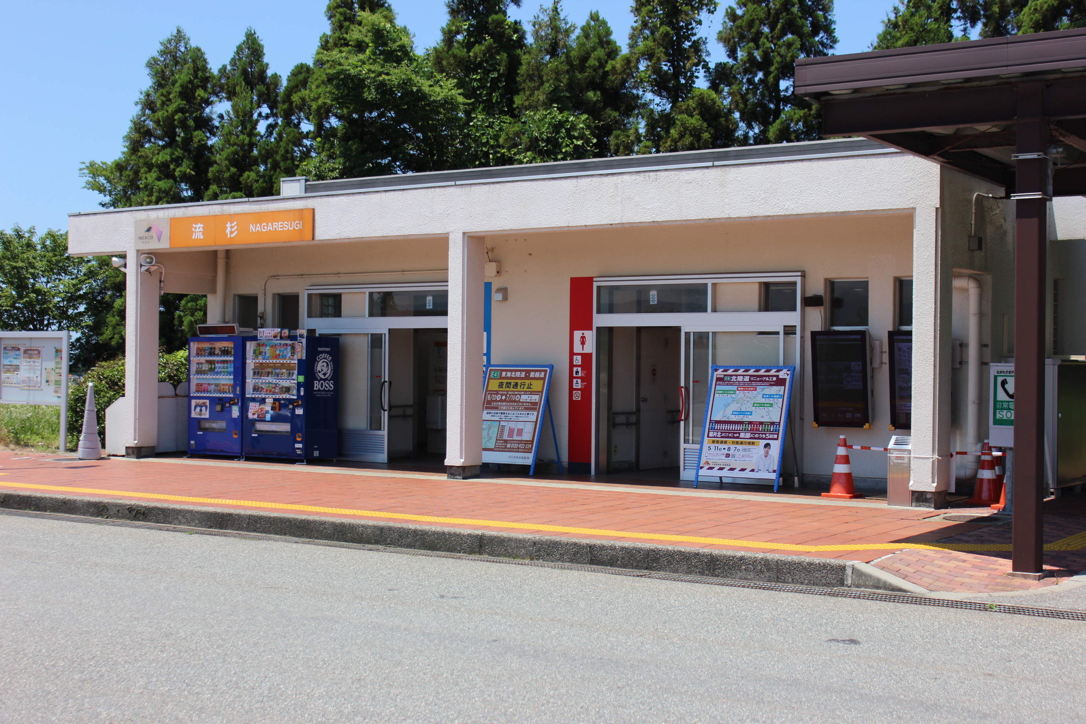 北陸自動車道流杉パーキングエリア（下り・新潟方面） Canon EOS Kiss X5